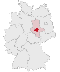 Salzlandkreis, Saxony-Anhalt, Germany